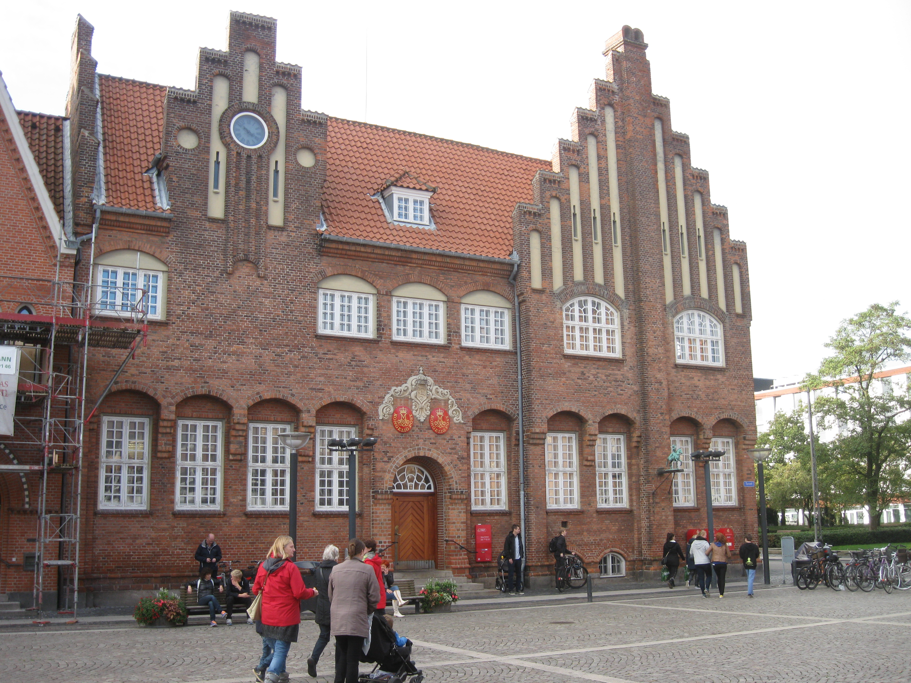 Esbjerg Posthus